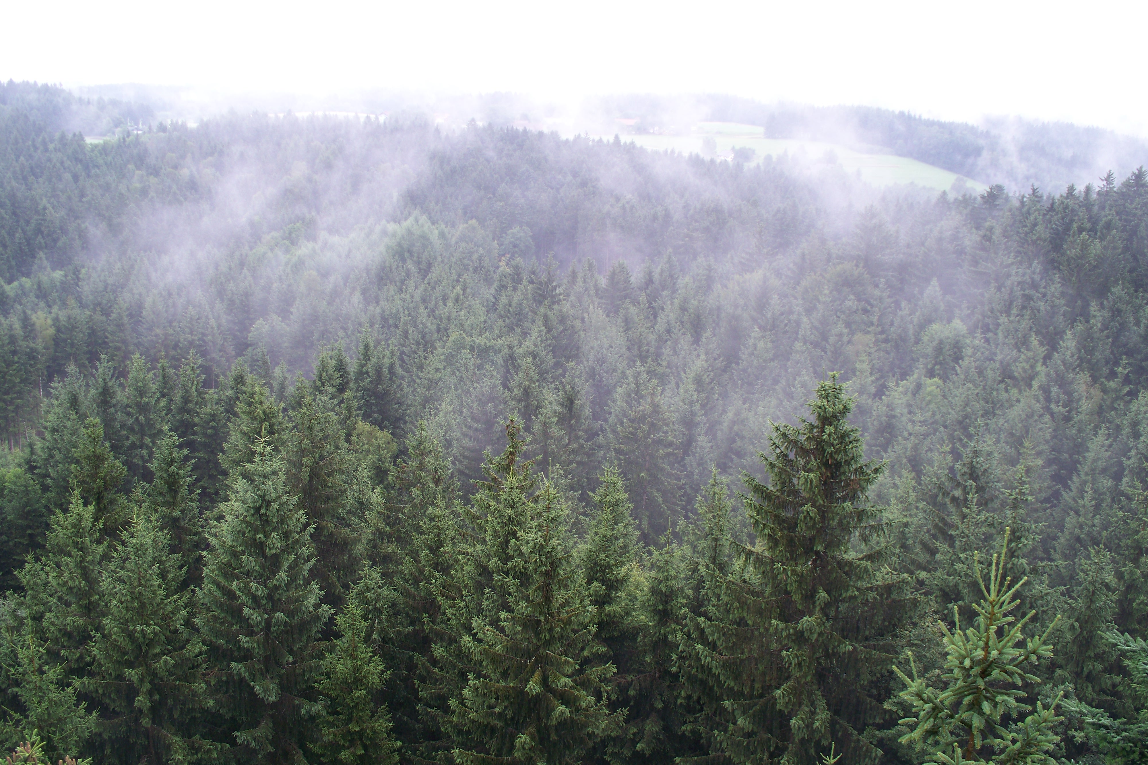 Der Sauwald in Oberösterreich, mit Picea abies.